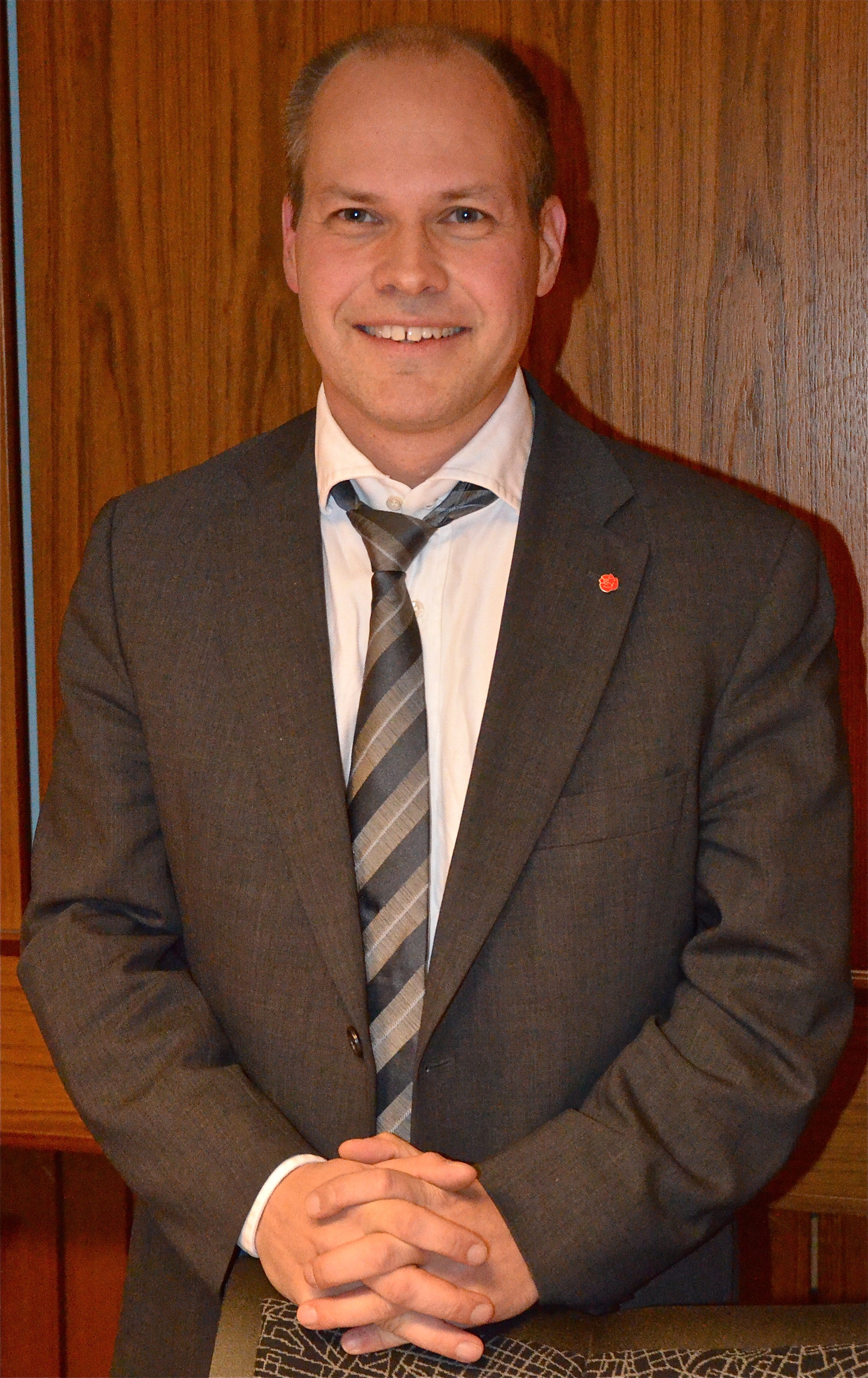 Morgan Johansson (S) på ABF i Stockholm 16 nov 2011.